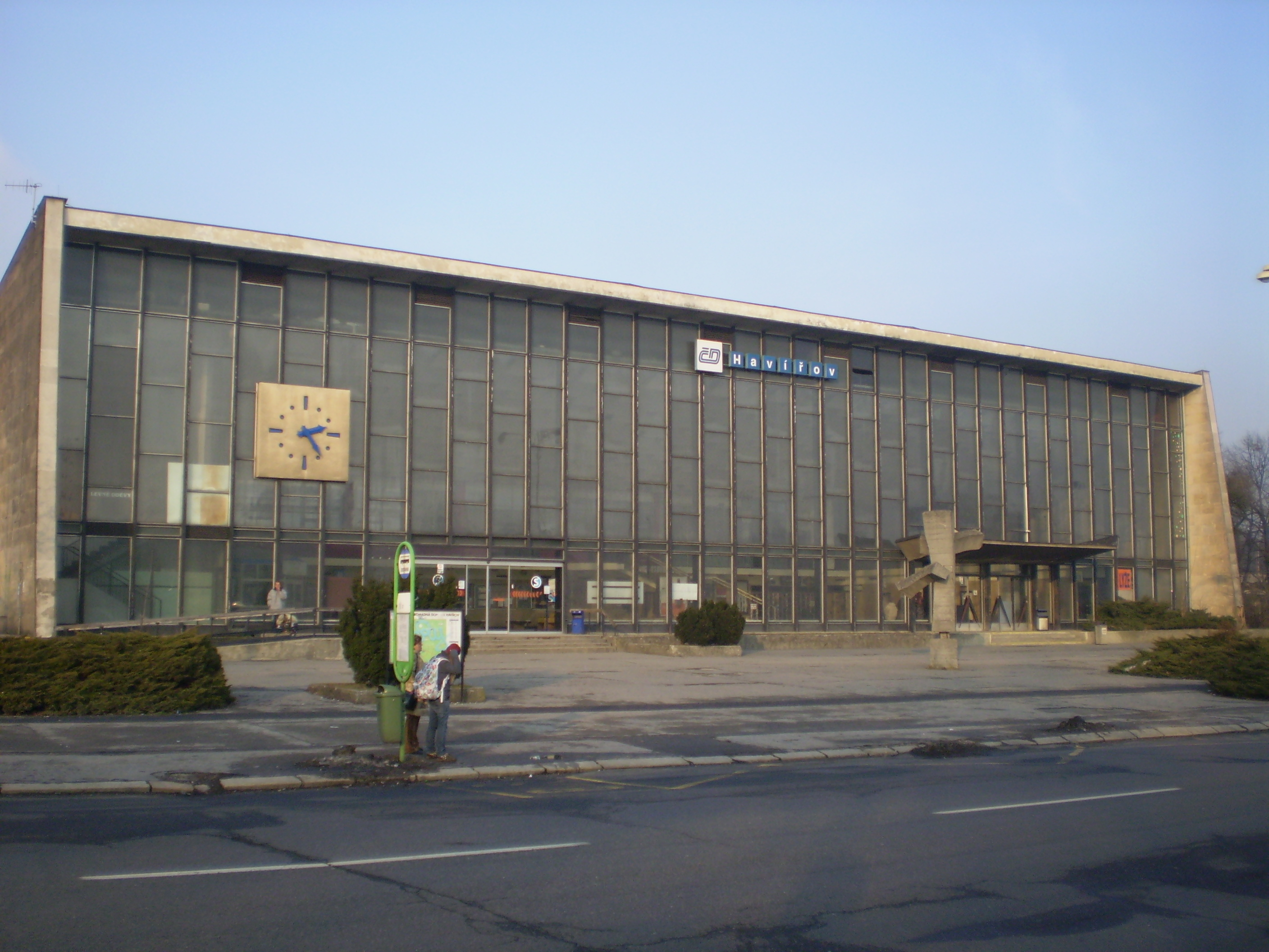 Budova vlakového nádraží v Havířově s plastikou Směrník v brutalistním stylu přemístěnou v roce 2014.